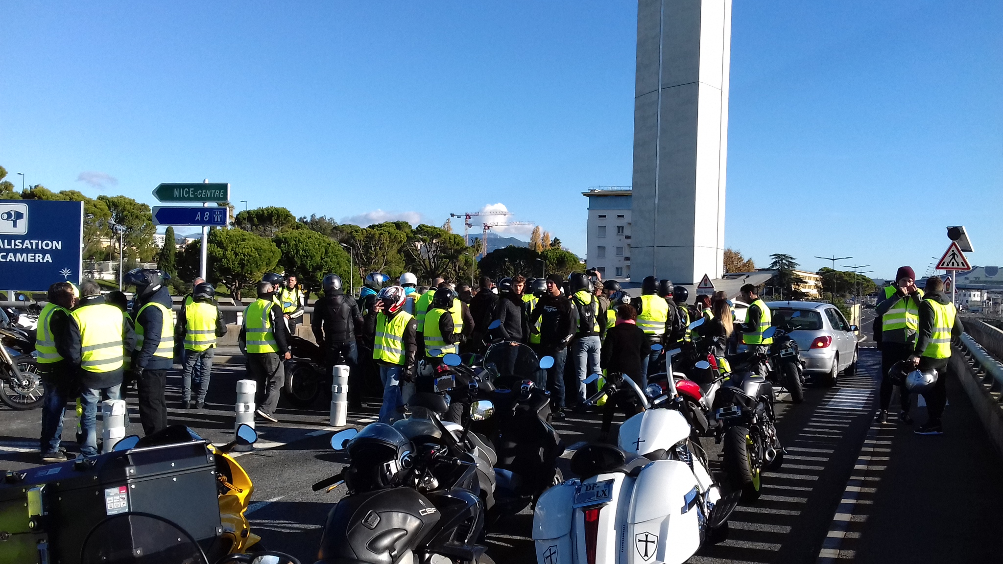 Mouvement des gilets jaunes Aeroport Nice 01 Dec 2018